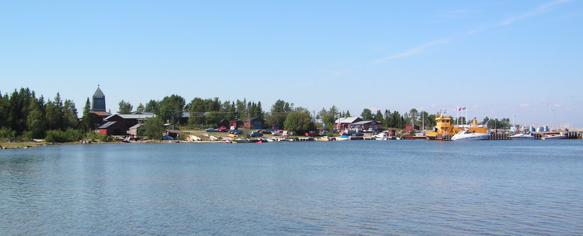 Byviken, Holmön, Sweden